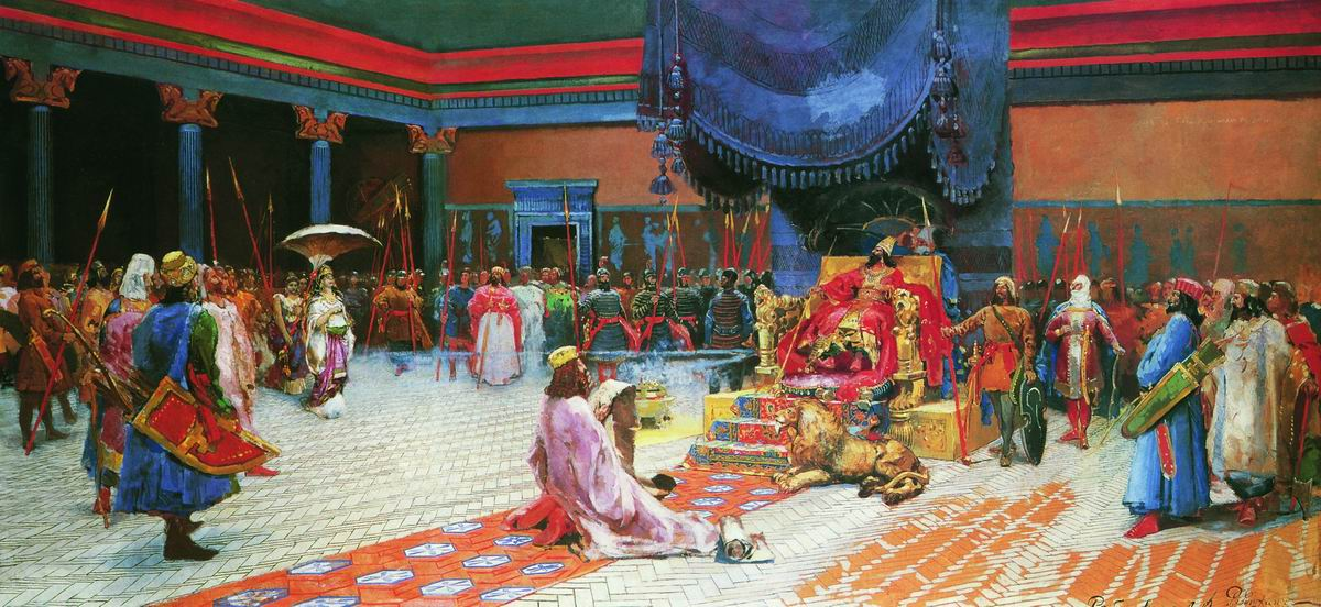 Эсфирь перед Артаксерксом. 1887. Бумага на холсте, масло. 107x221 см. Государственный Русский музей, Санкт-Петербург